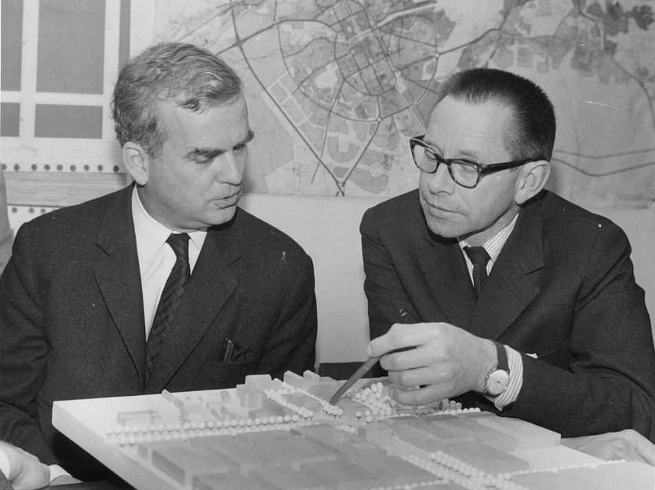 Arkitekterna Torbjörn Olsson (1916-1998) och Sven Silow (1918-2001) vid en modell av det nya Slottstorget i Gävle.